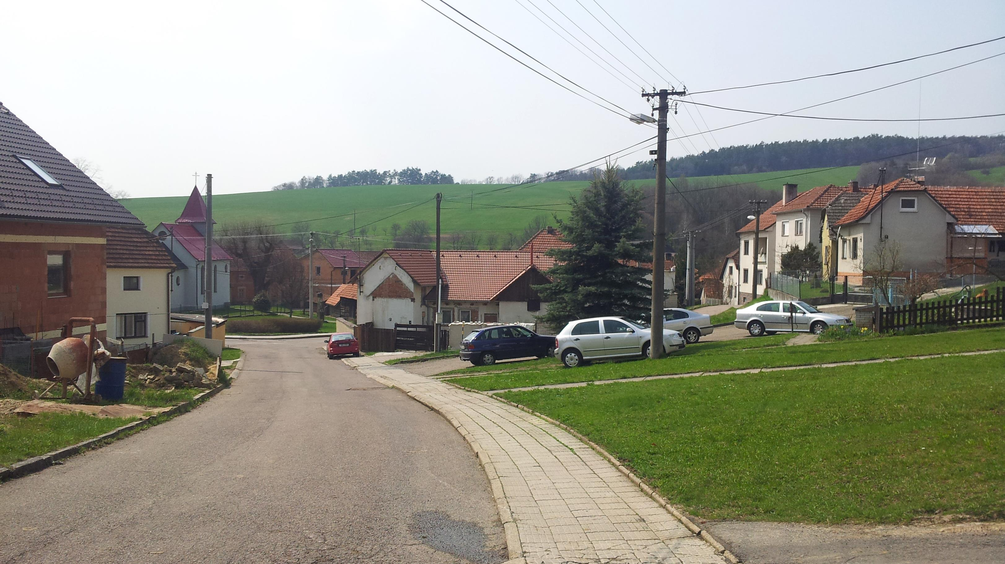 Kaňovice